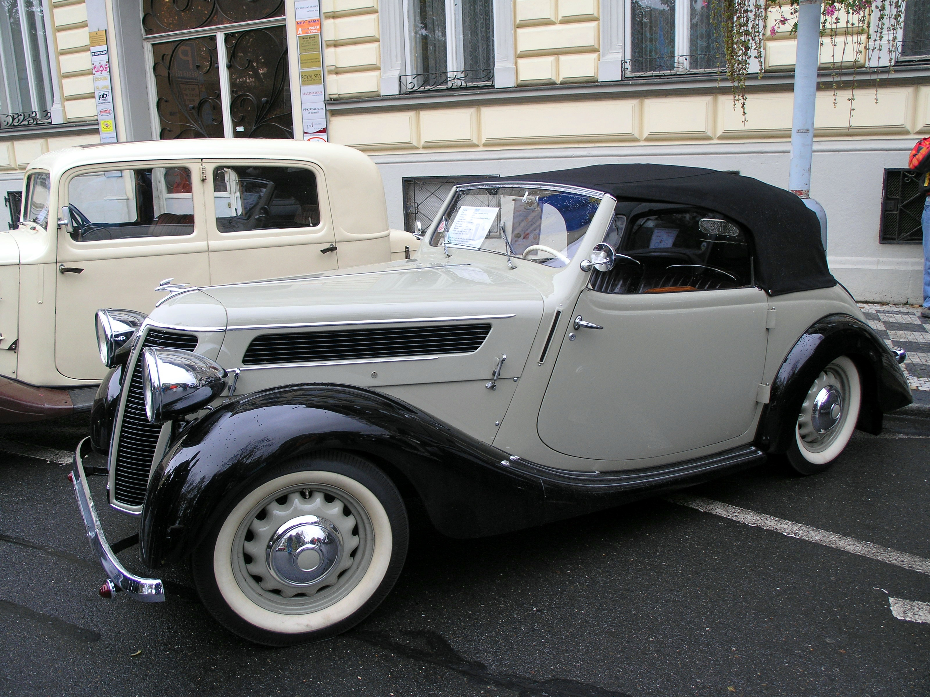 Vůz Praga Piccolo (1933) účastnící se jízdy veteránů u příležitosti 90. výročí vzniku samostatného Československa, 28. října 2008